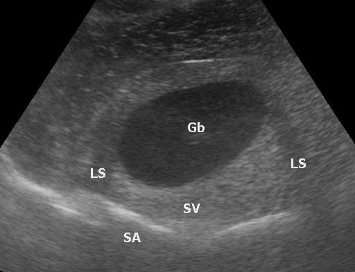 Prinzipbedingte sonographische Artefakte. Gb-Gallenblase. SV-distale Schallverstärkung; SA-distale Schallauslöschung; LS-lateral shadowing